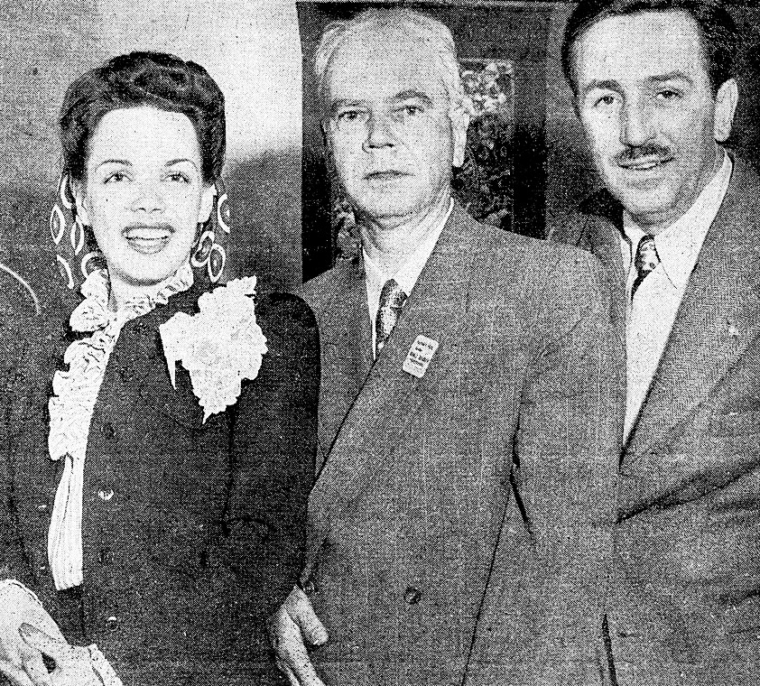 Aurora Miranda ao lado do correspondente brasileiro Belisário de Souza, do Jornal do Brasil e de A Noite ao lado de Walt Disney.